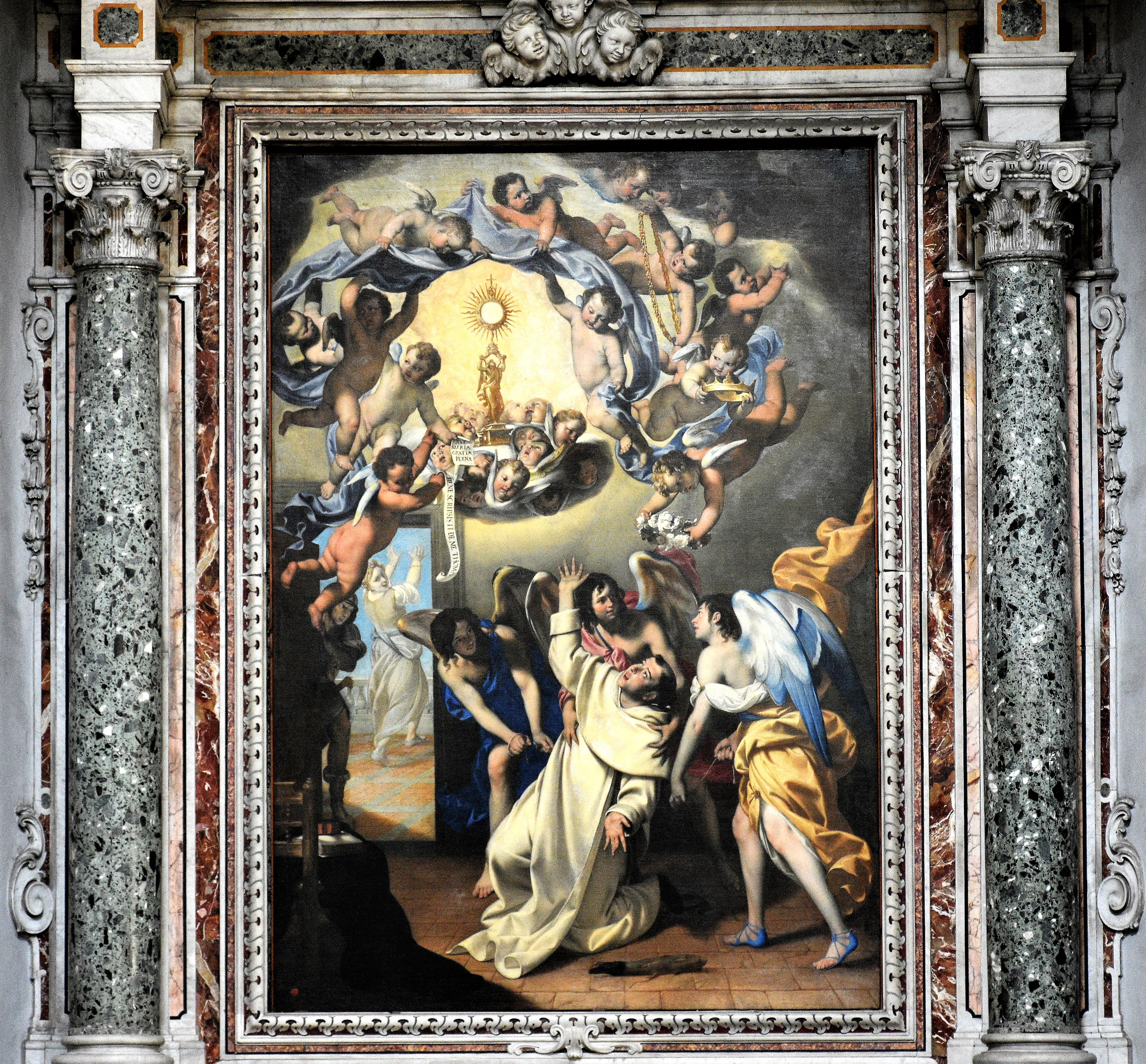 Nella tela vediamo gli Angeli che impongono il cingolo della castità a San Tommaso d'Aquino.